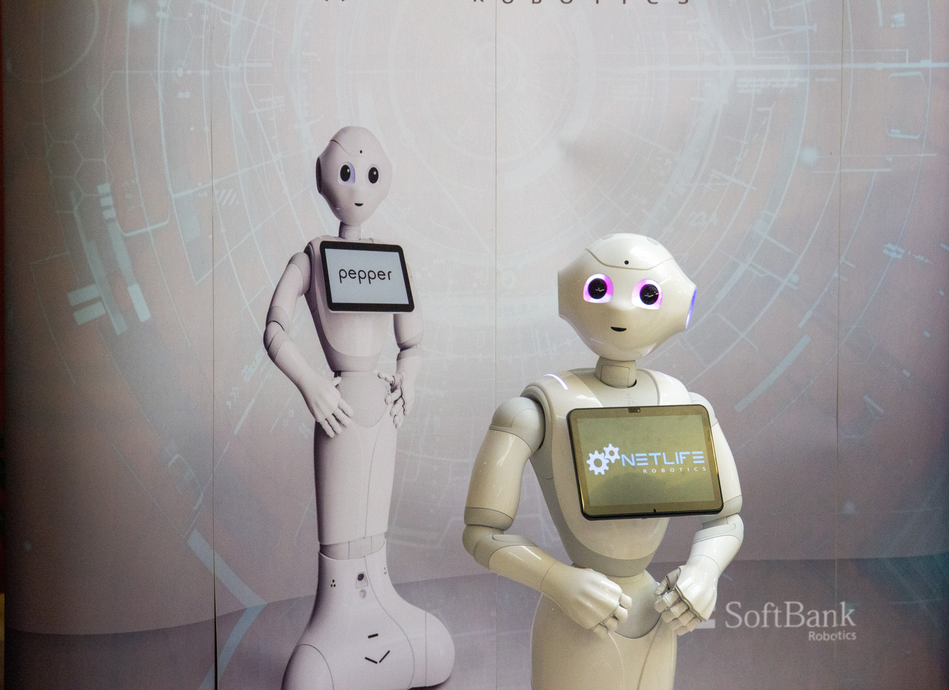 Pepper robot egy magyar rendezvényen